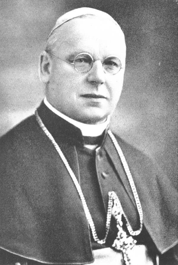 Bischof Matthias Ehrenfried (*1871-†1948) Bischof von Würzburg (1924-1948) Bischofsvisitation 1935